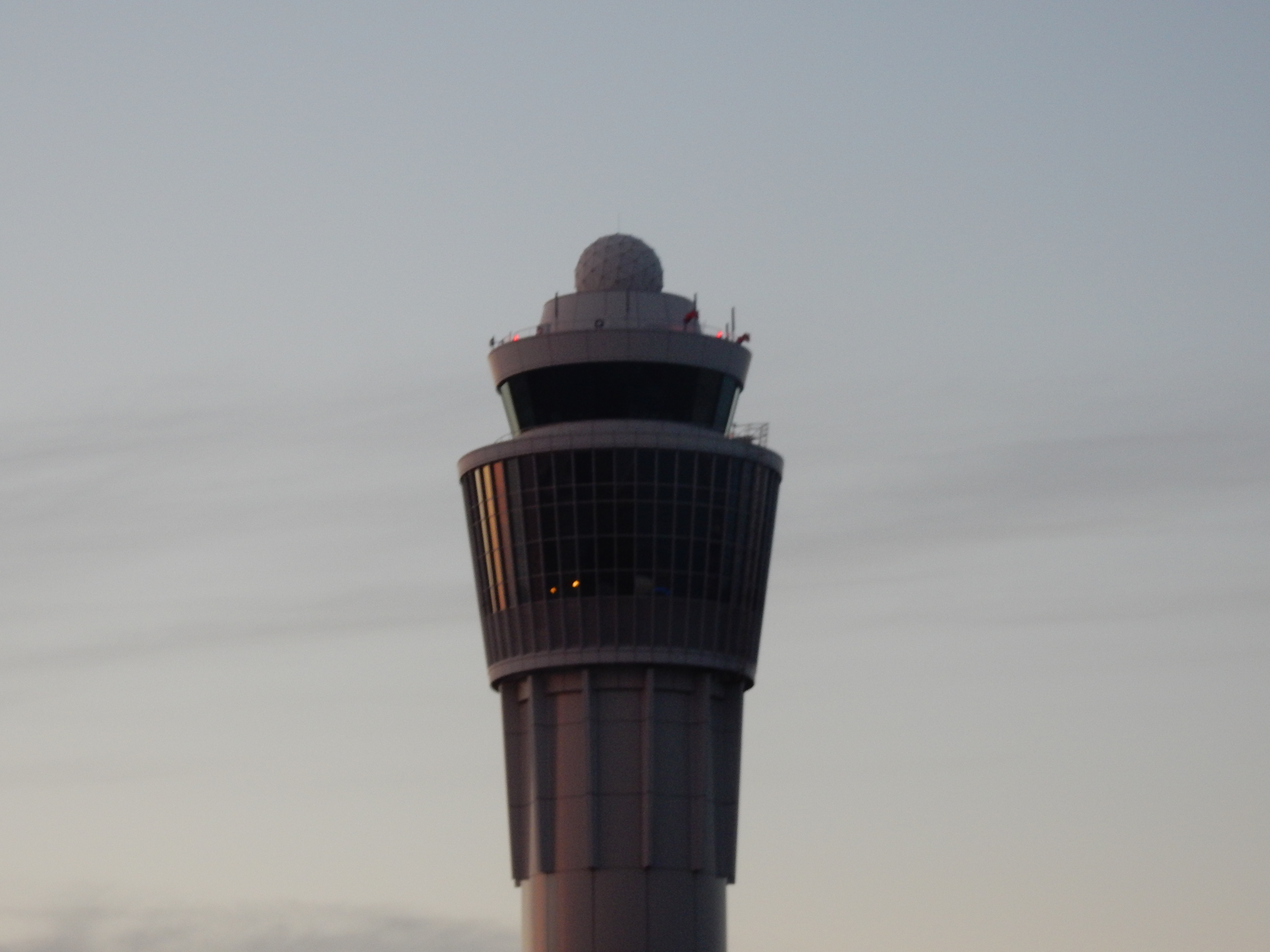 中部国際空港管制塔